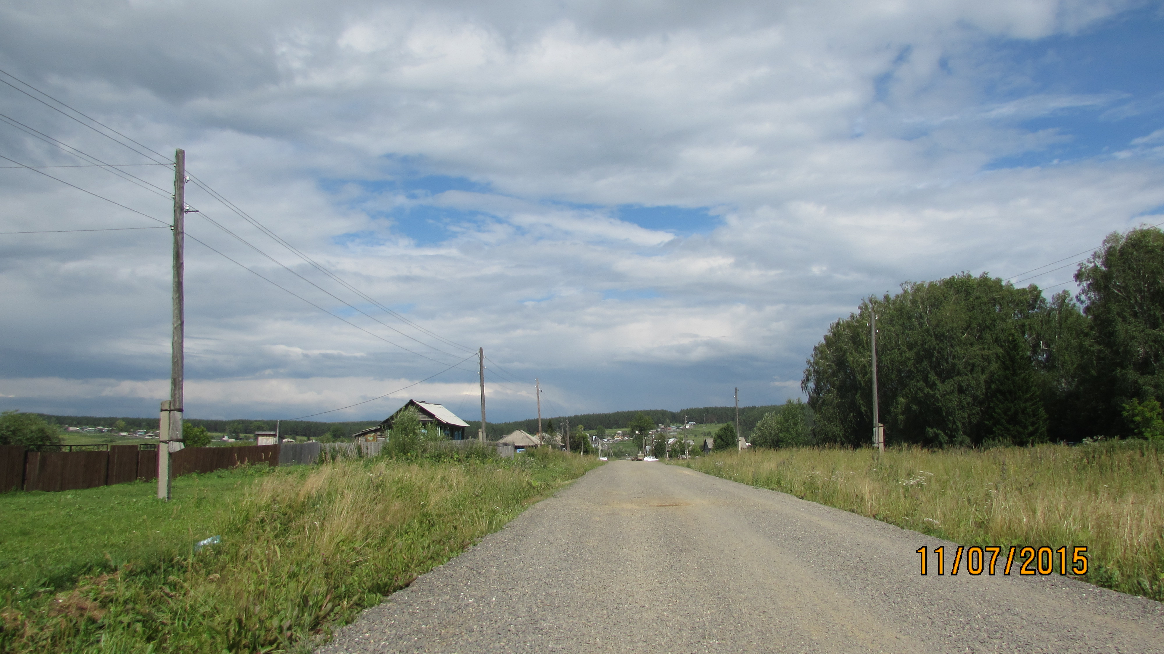 ул. Линейная